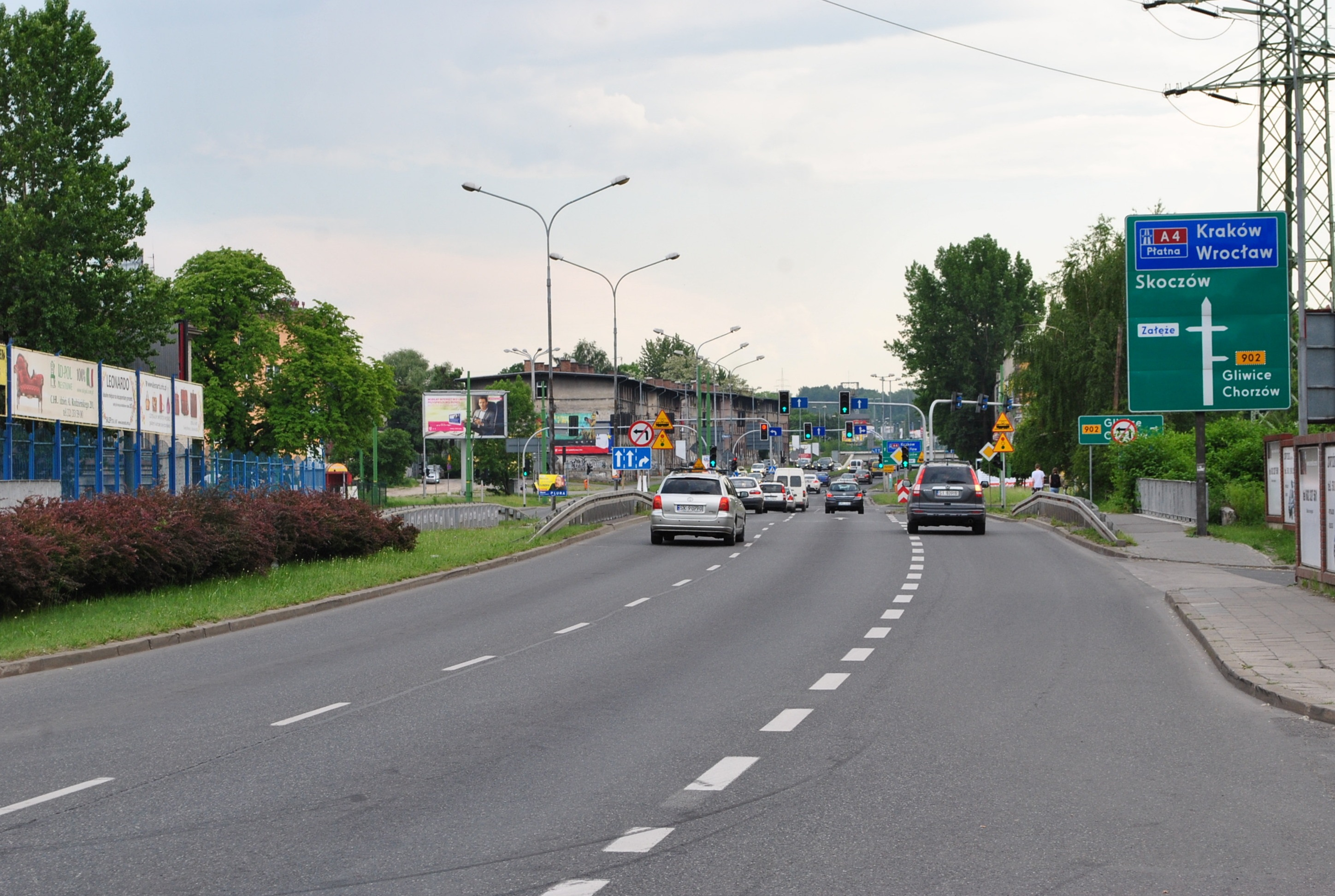 Katowice. Ulica Bracka (widok w kierunku południowym)